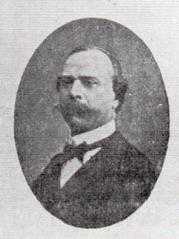 Foto di Francesco Paolo Palizzi (1825-1871) tratta dal libro Histonium ed il Vasto di Vittorio D'Anelli 1978